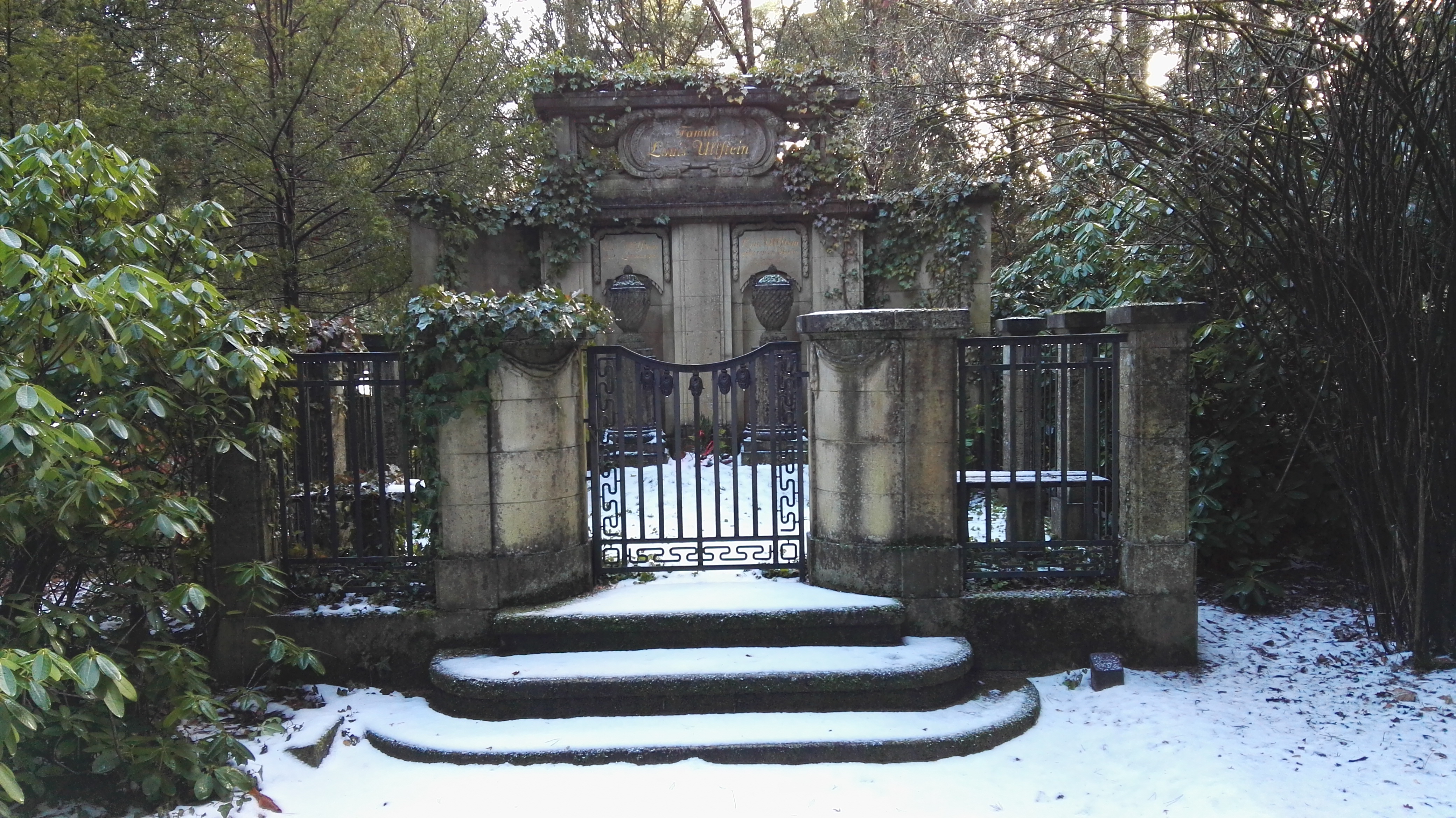 Grab von Louis Ullstein auf dem Südwestkirchhof Stahnsdorf